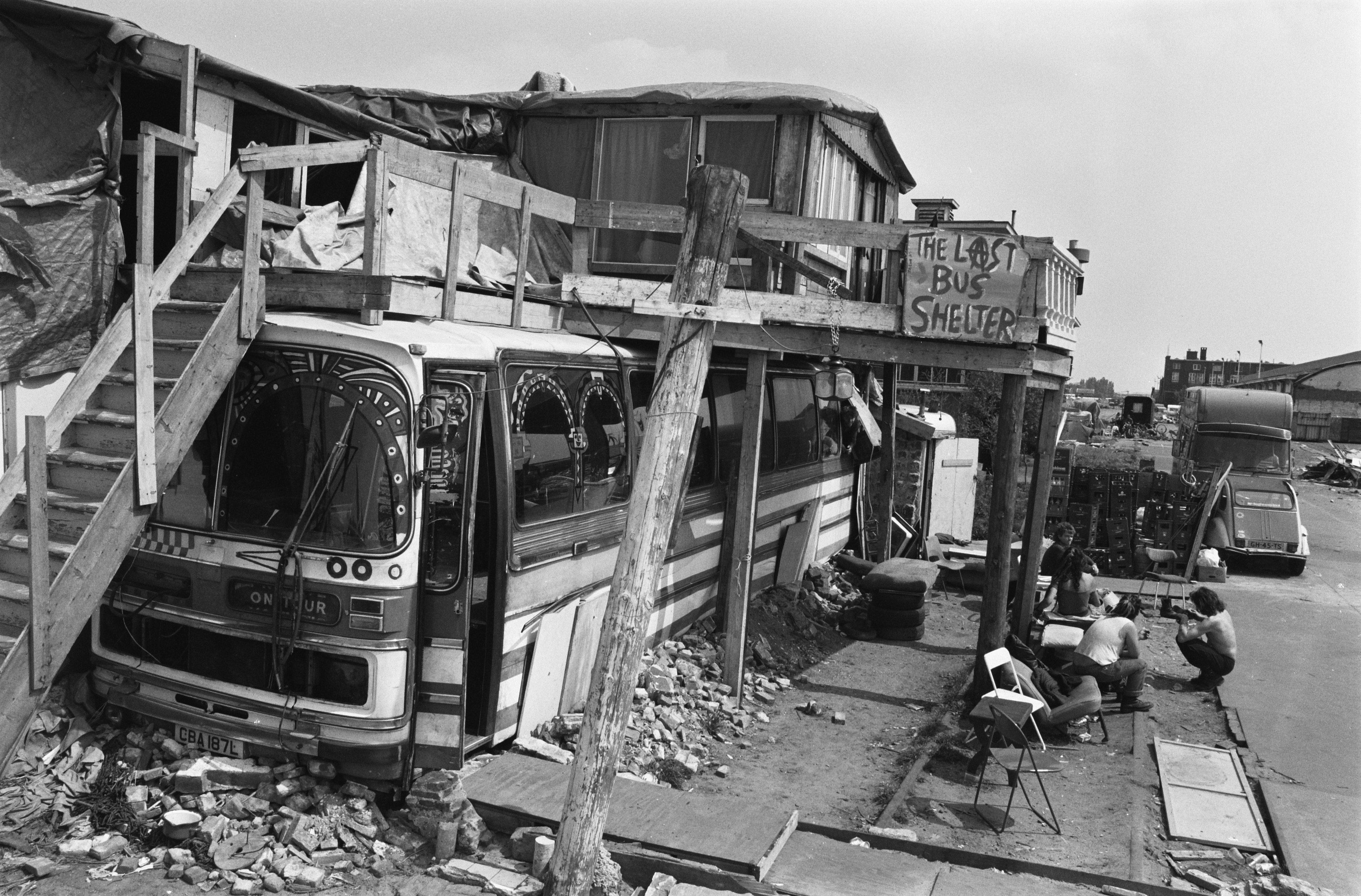 Collectie / Archief : Fotocollectie Anefo Reportage / Serie : Illegale bouwsels op het"KNSM eiland" in het Oostelijk Havengebied Amsterdam Beschrijving : Autobus met uitbreidingen Datum : 16 mei 1989 Locatie : Amsterdam, Noord-Holland Trefwoorden : bussen Fotograaf : Bogaerts, Rob / Anefo Auteursrechthebbende : Nationaal Archief Materiaalsoort : Negatief (zwart/wit) Nummer archiefinventaris : bekijk toegang 2.24.01.05 Bestanddeelnummer : 934-4543